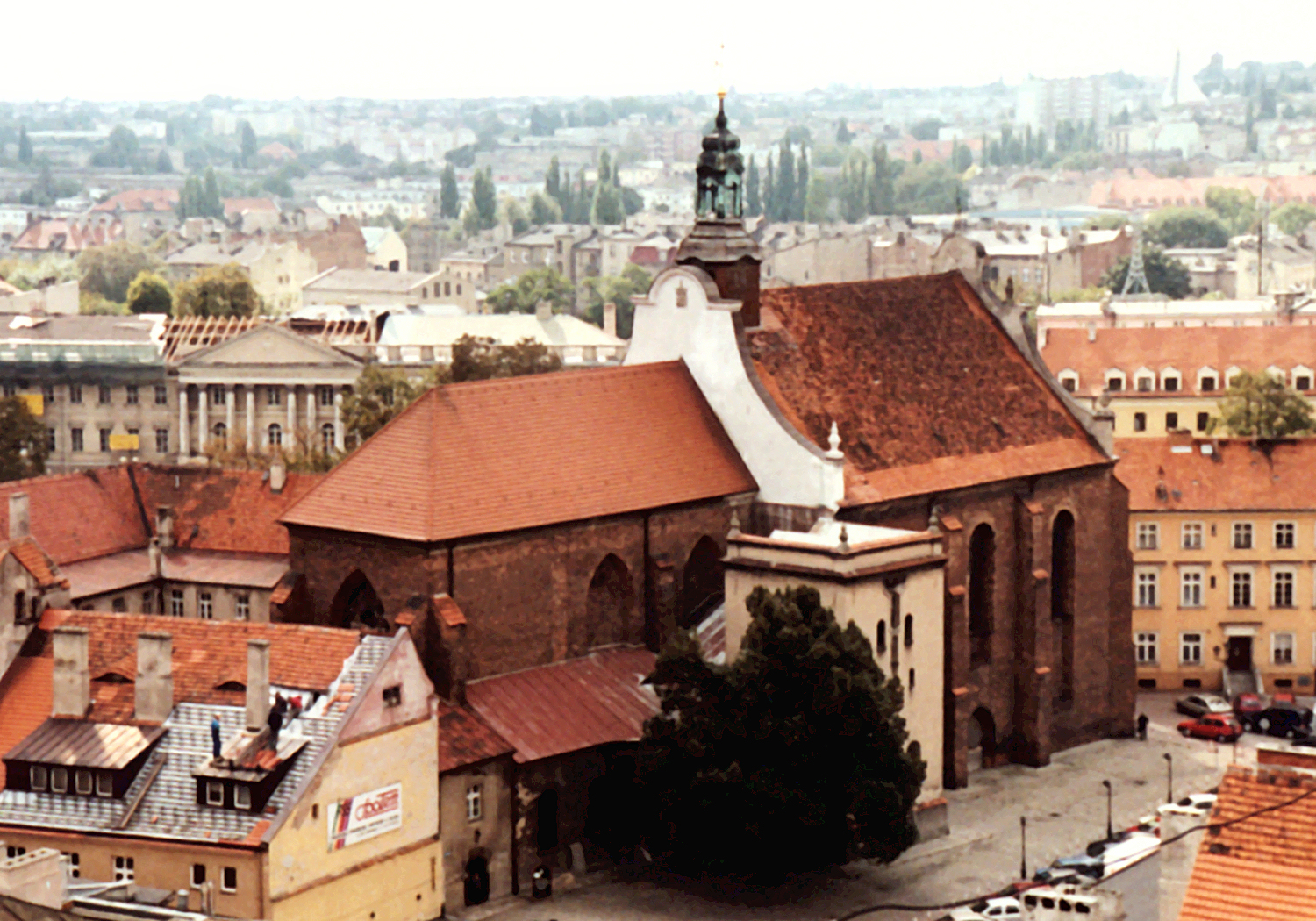 Kalisz, zespół klasztorny franciszkanów, ul. Sukiennicza 7; kościół p.w. św. Stanisława (zabytek nr rejestr. 59)